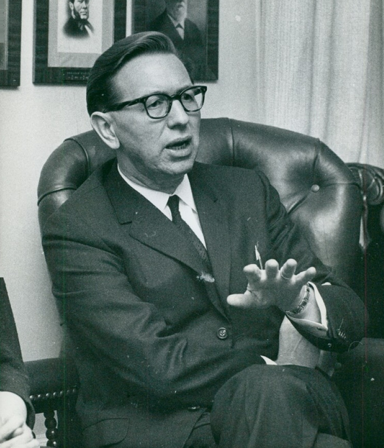 Nils Bejerot, 1968. Införd i Svenska Dagbladet 1968-02-08 s. 6 (